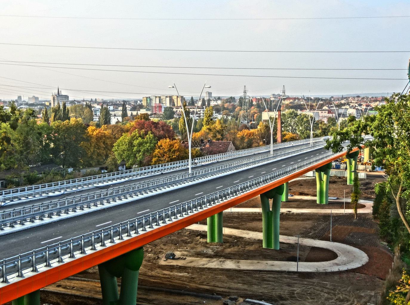 Trasa Uniwersytecka w Bydgoszczy